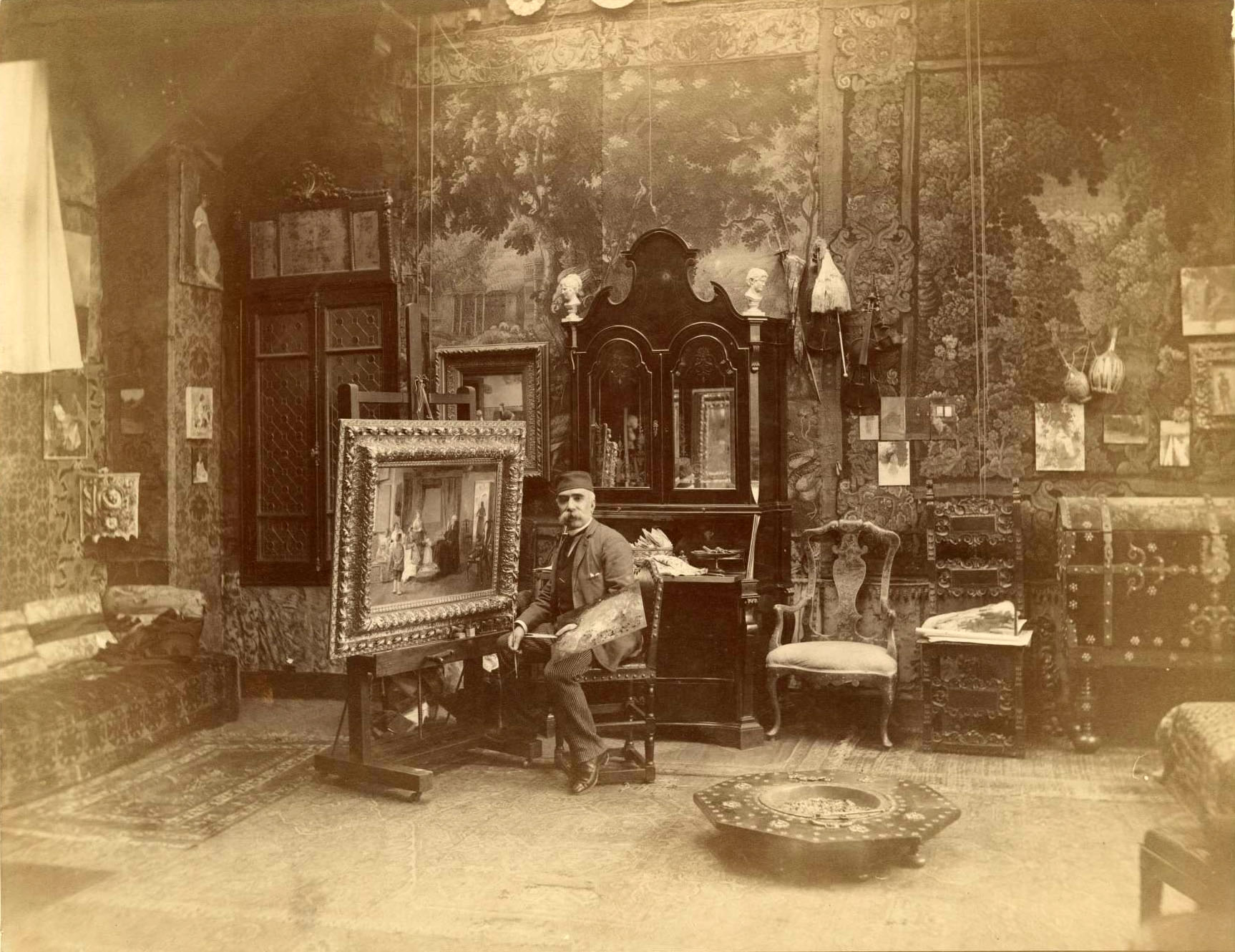 Luis Jiménez Aranda in his studio